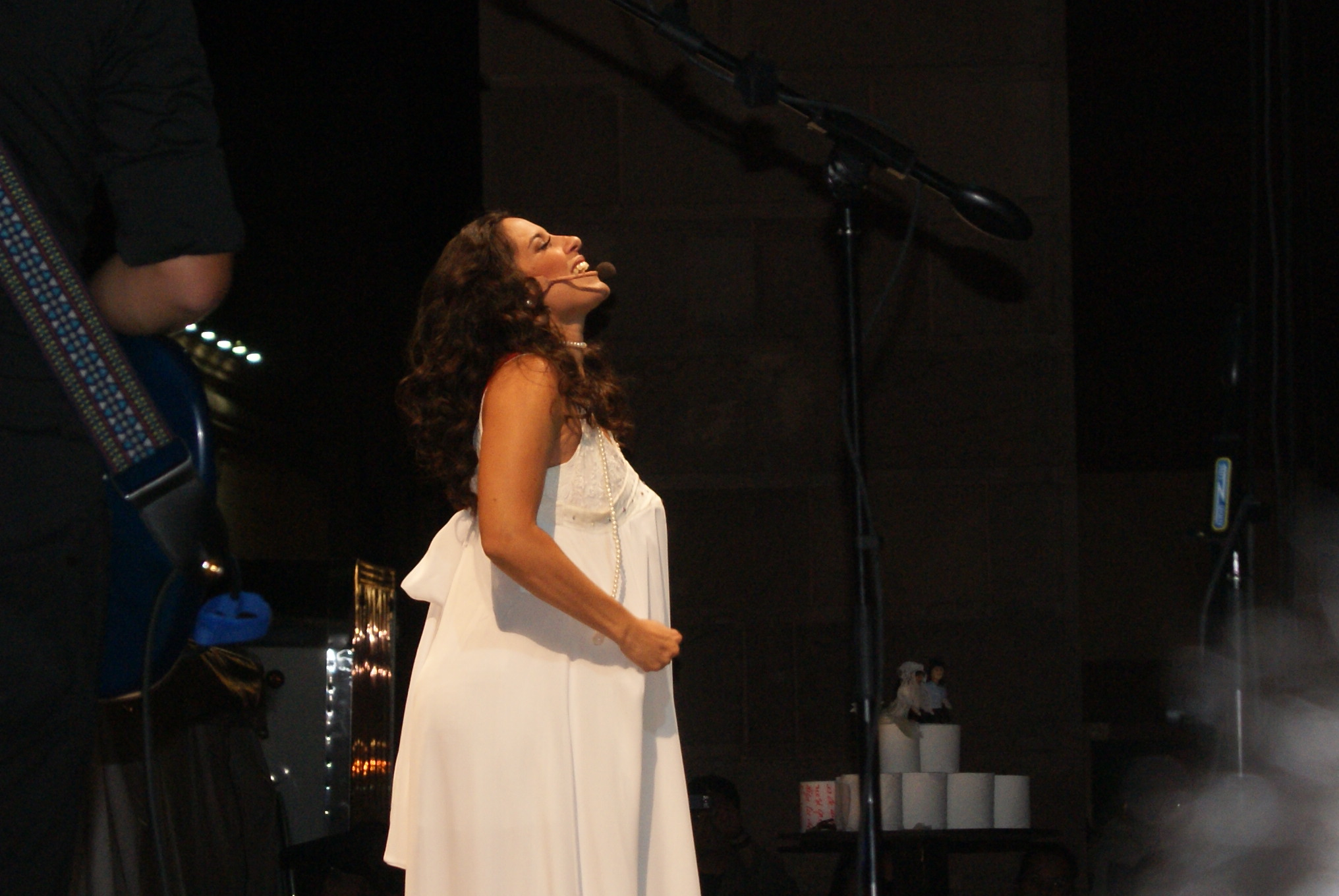 "Con la p en la frente"